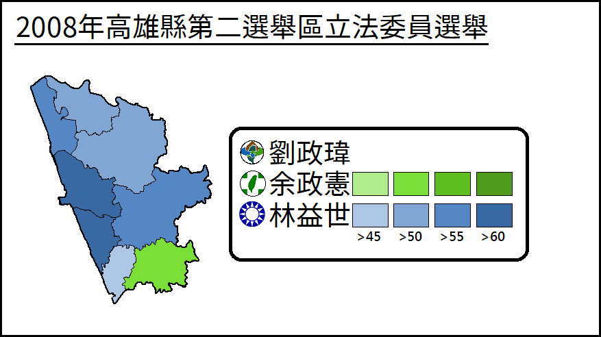 2008年高雄縣第二選舉區立法委員選舉得票